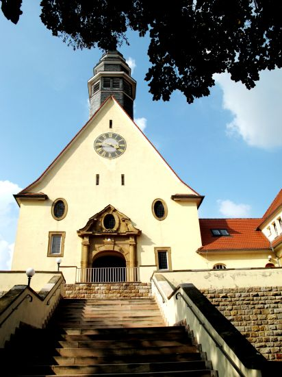 Worms-Horchheim evangelische Kirche (1907-08)